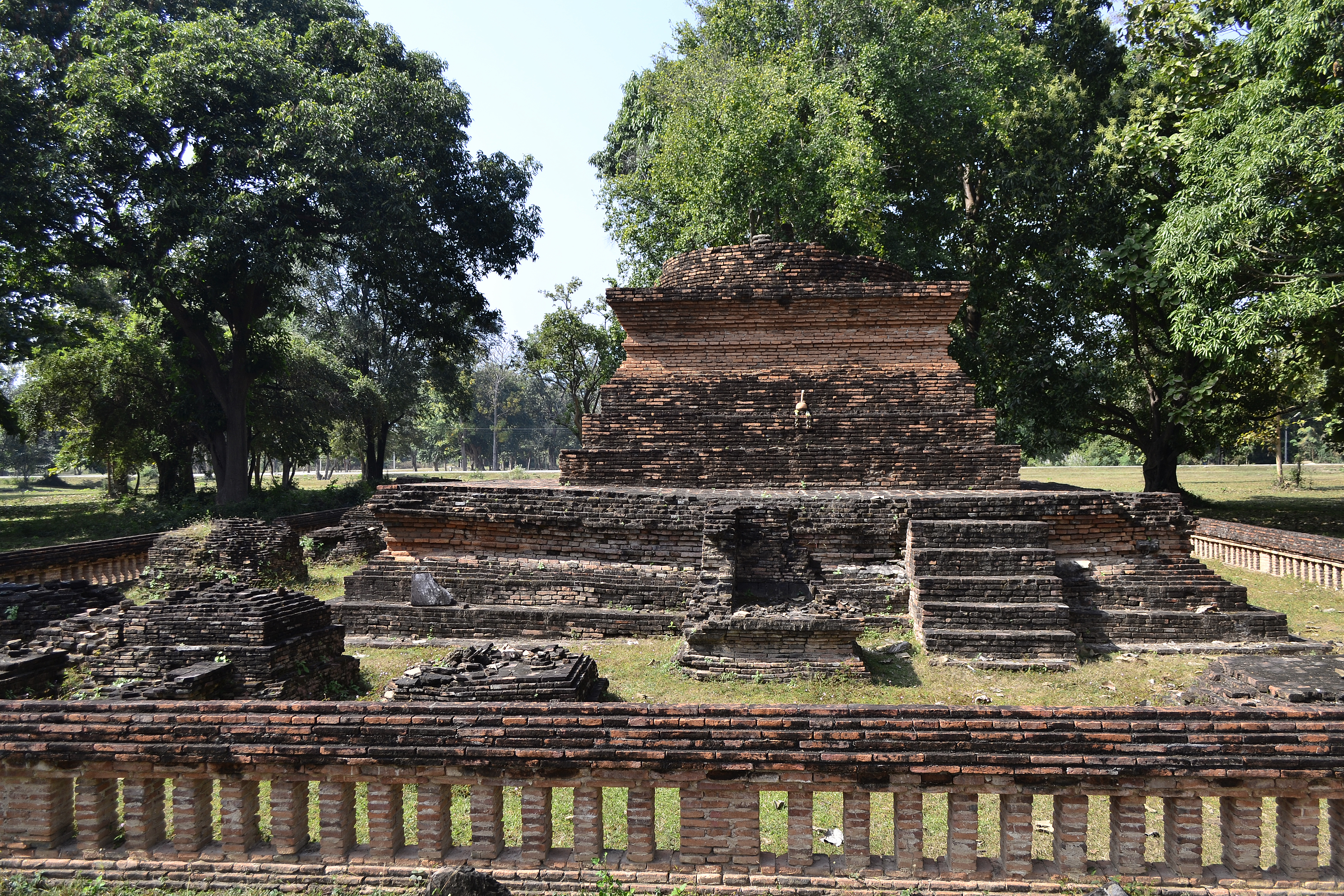 Wat Pa Mamuang im Geschichtspark Sukhothai